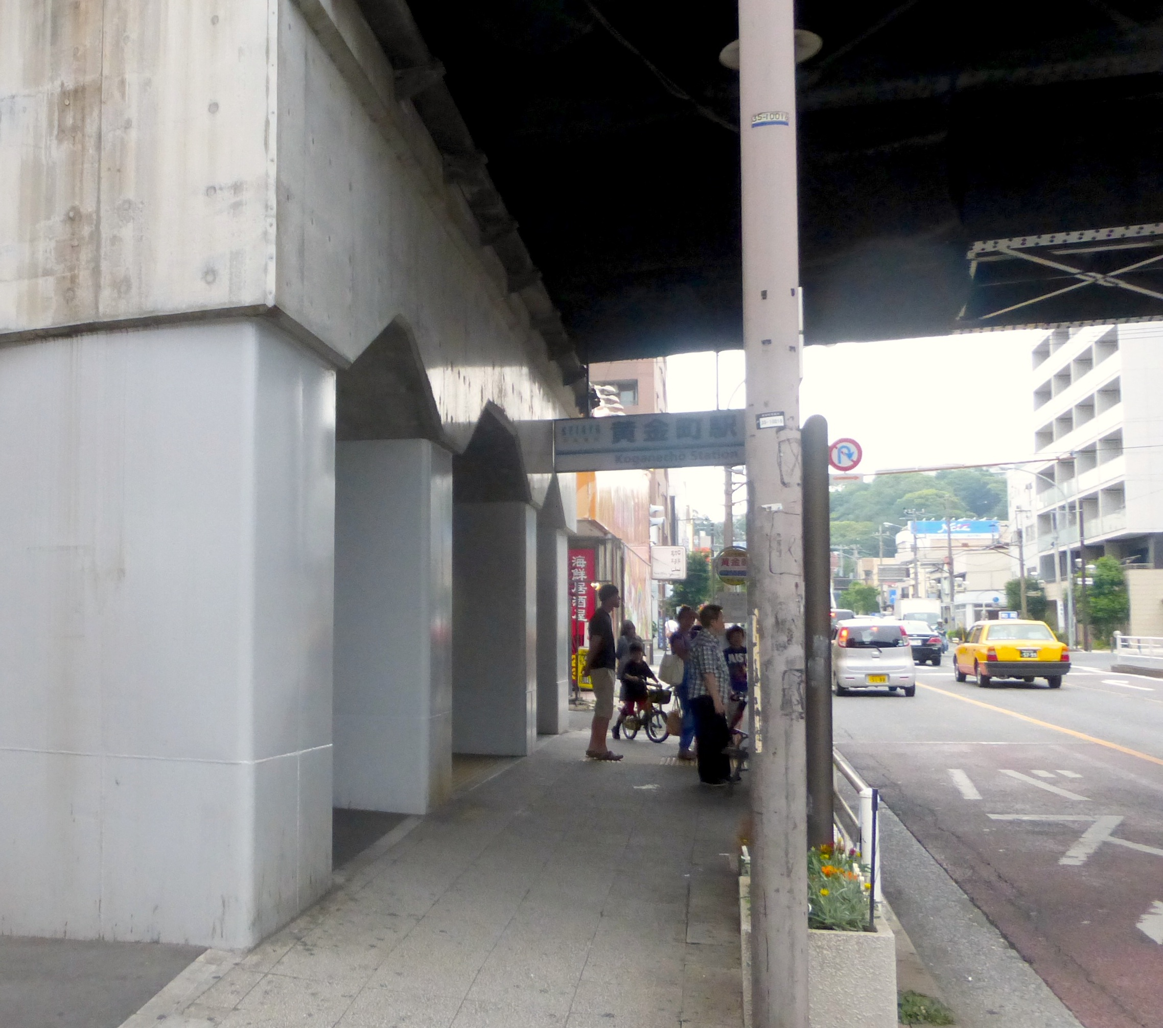 Koganechō Station entrance/exit (黄金町駅の出入り口）